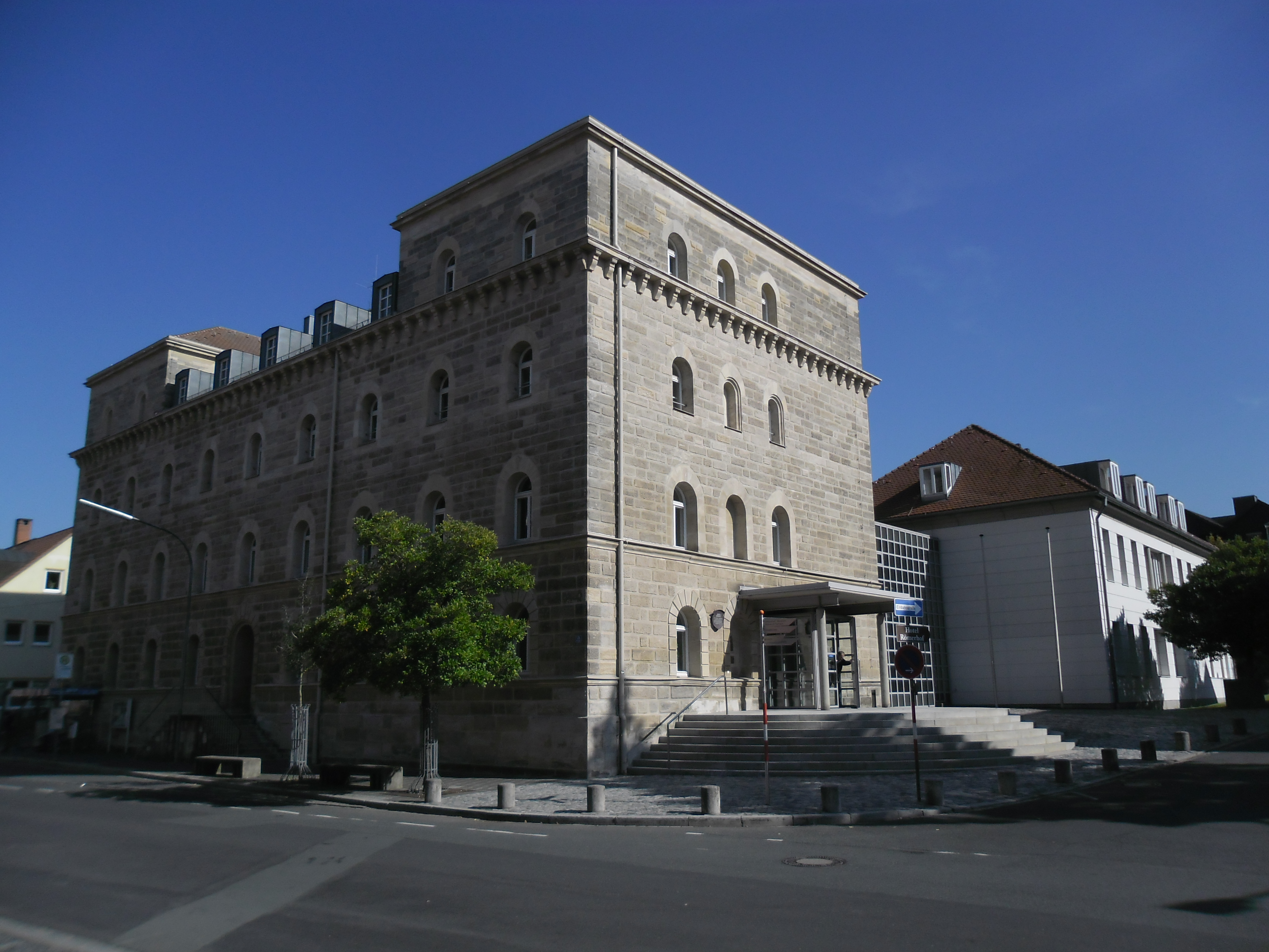 Blick von Westen auf das Gebäude des Neustädter Amtsgerichtes in der Bamberger Straße 28 nordöstlich des Hauptmarktes